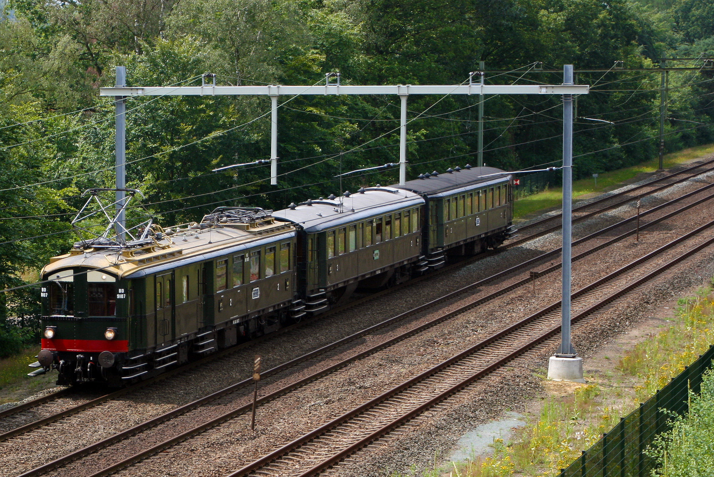 De Blokkendoos van het Spoorwegmuseum passeert hier bijna het ecoduct Op Hees.